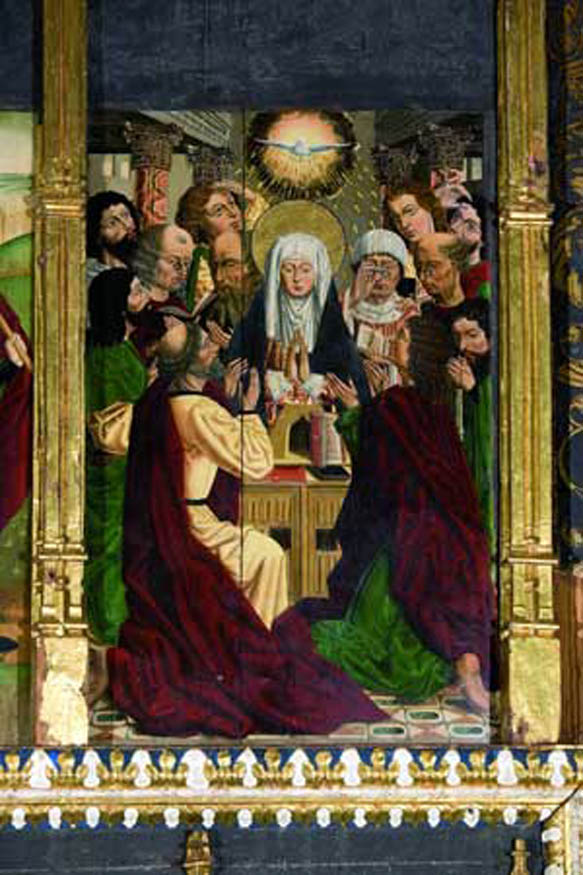 Aonso de Sedano, tabla de la Pentecostés, retablo de la Virgen, hacia 1510, iglesia parroquial de Montenegro de Cameros (Soria)